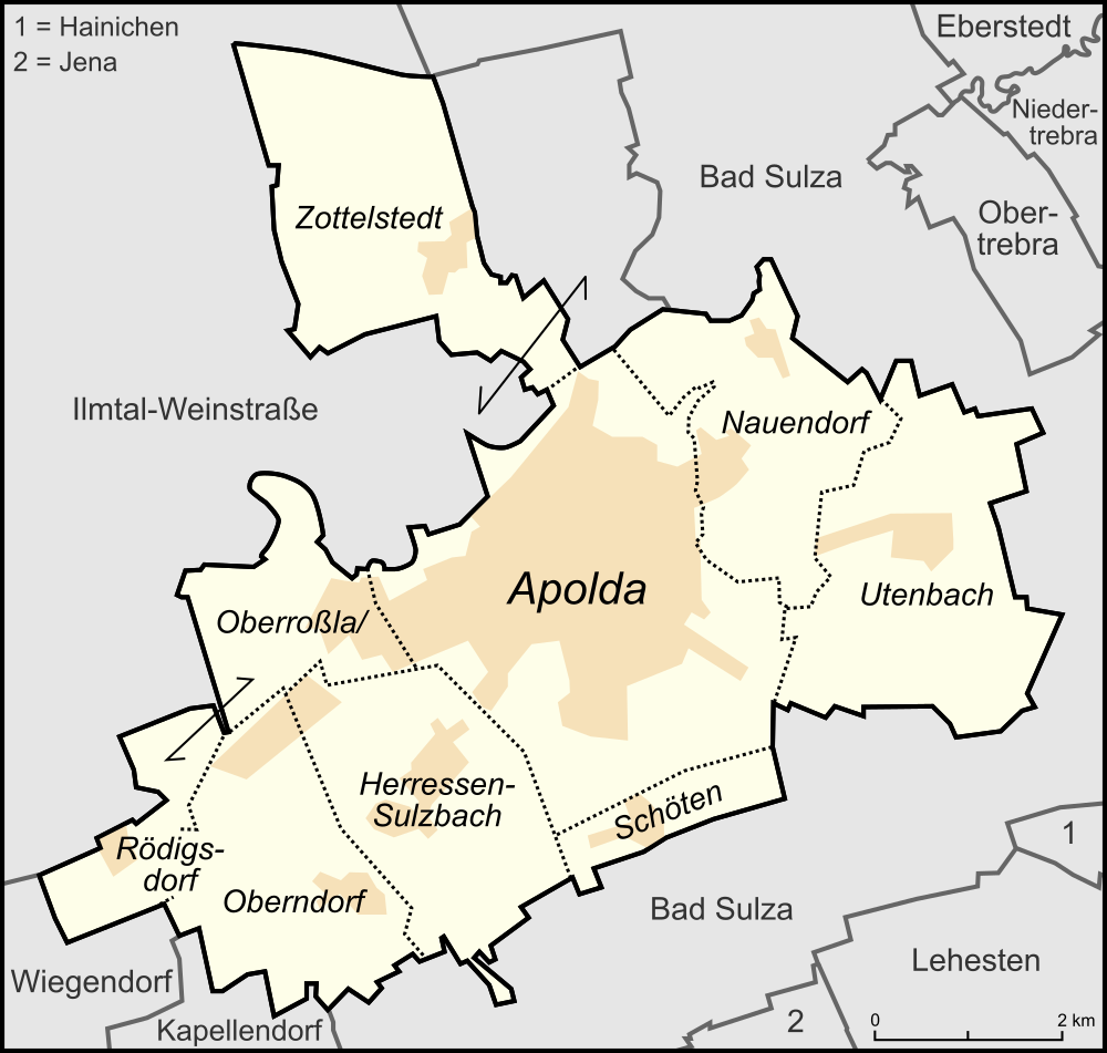 Karte der Ortsteile der Stadt Apolda